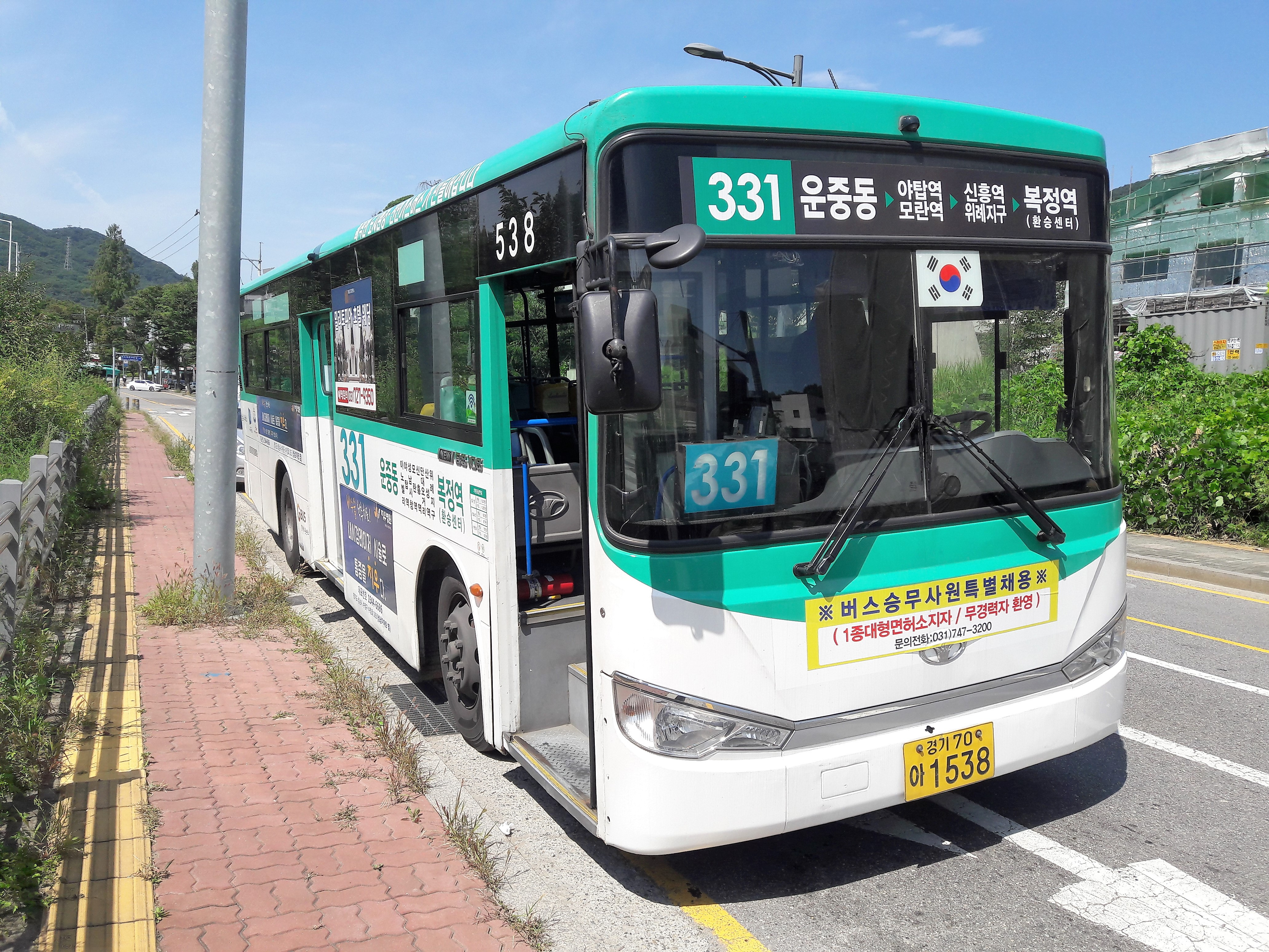 성남시내버스 331번